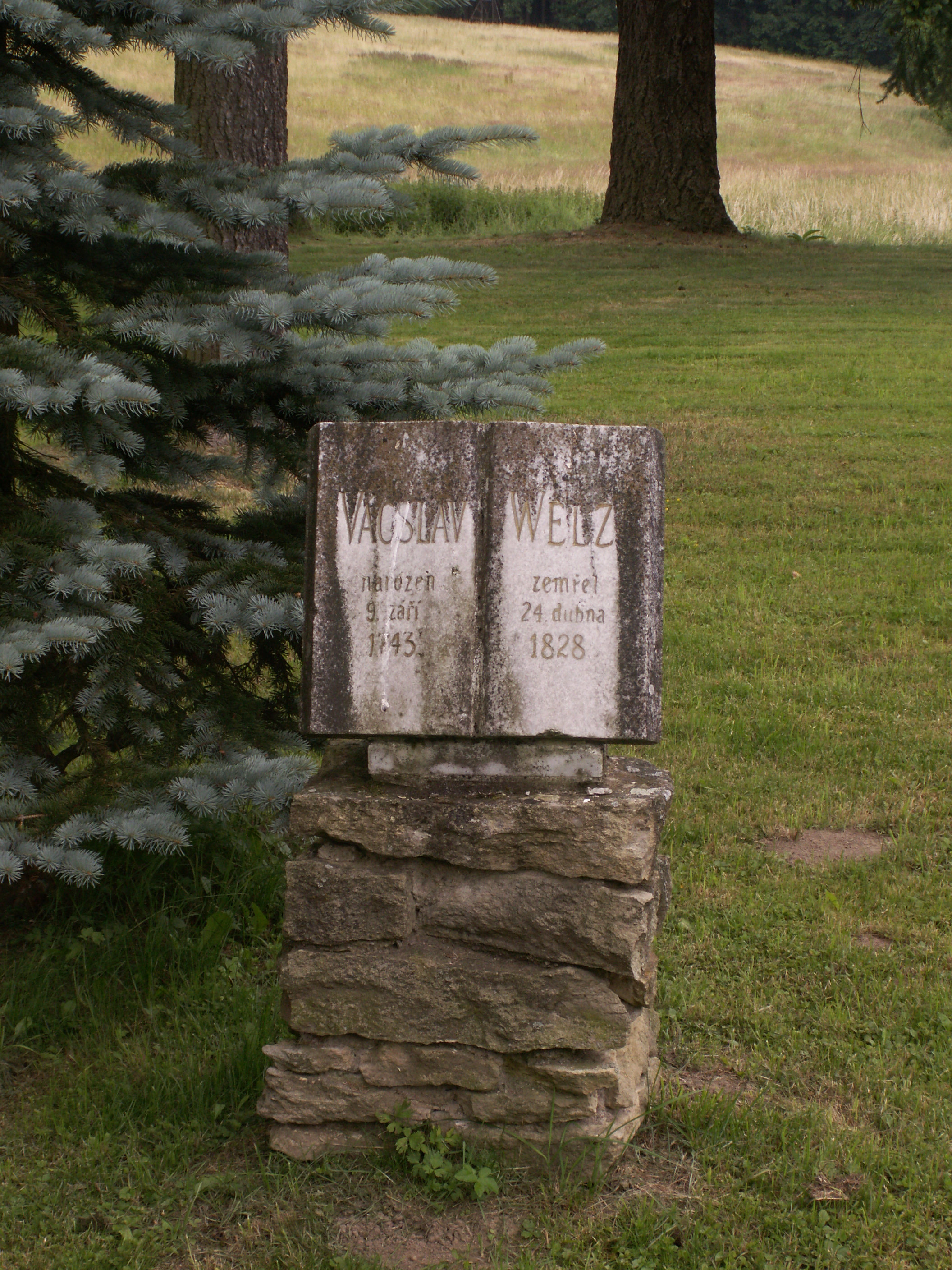 památník jednoho z majitelů sklárny Dobrá Voda (část obce Malčín), okres Havlíčkův Brod